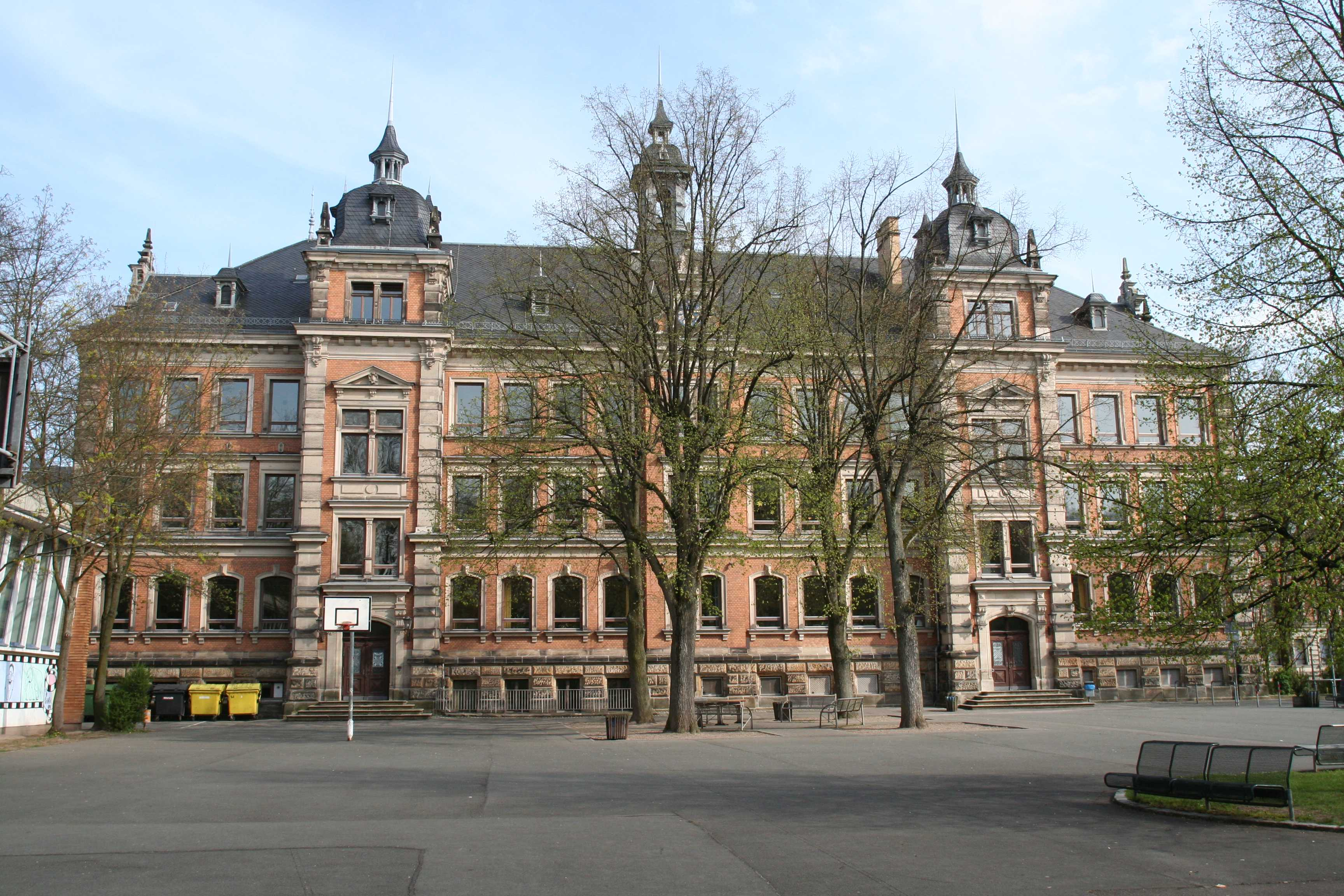 Coburg, Löwenstraße 28, Rückertschule